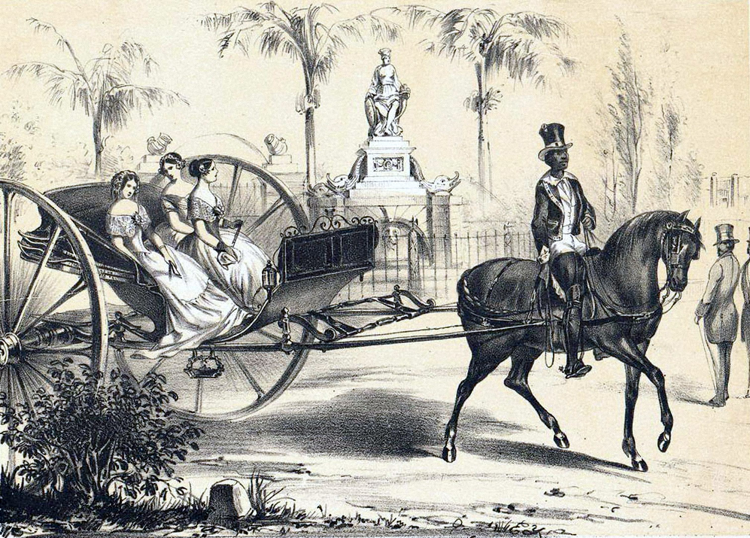 El quitrín